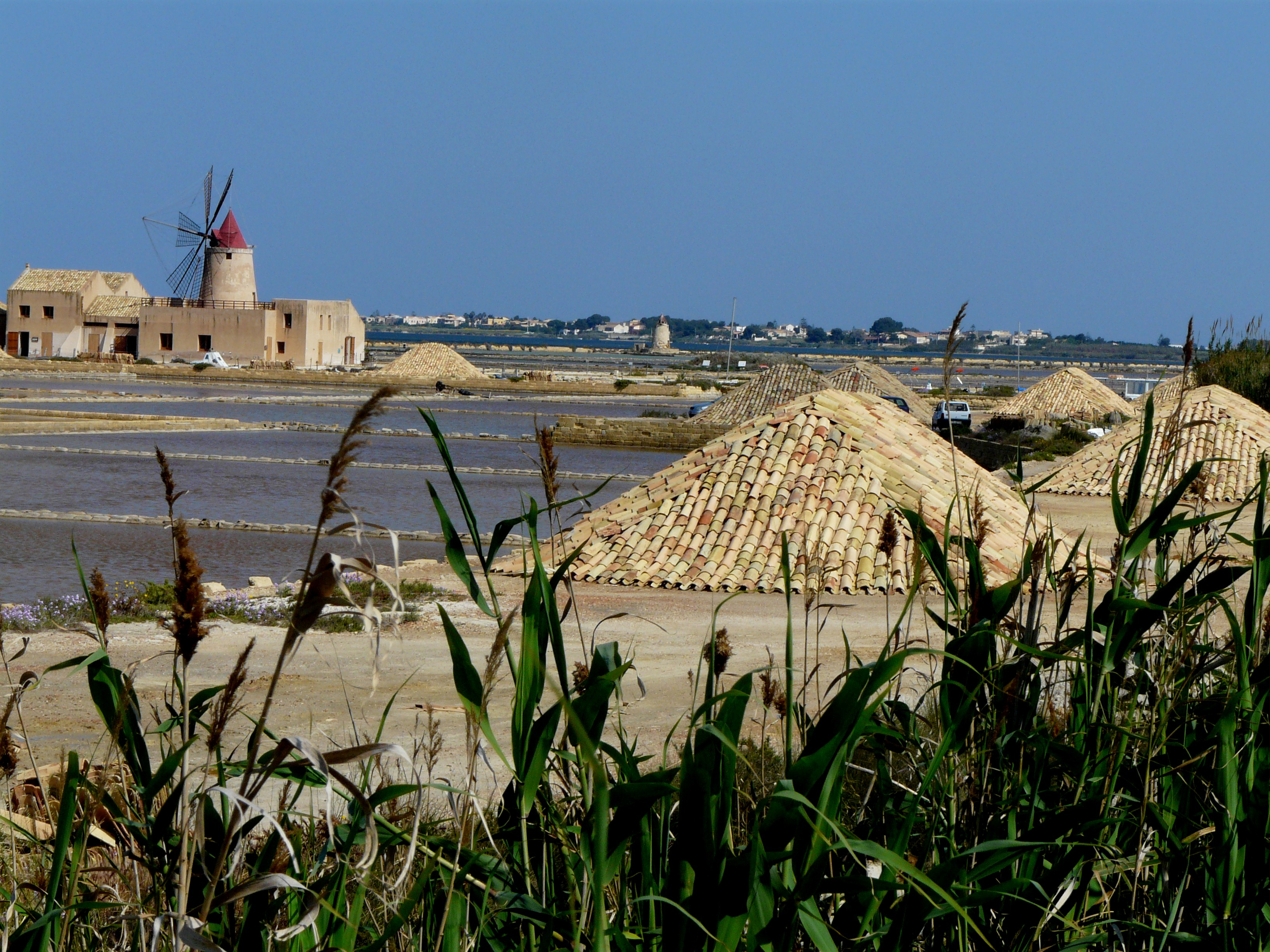 Saline di Trapani e Paceco - Riserva Naturale Regionale This is a photo of a monument which is part of cultural heritage of Italy. The authorisation for taking photos of this object was provided by the World Wide Fund for Nature Italy.